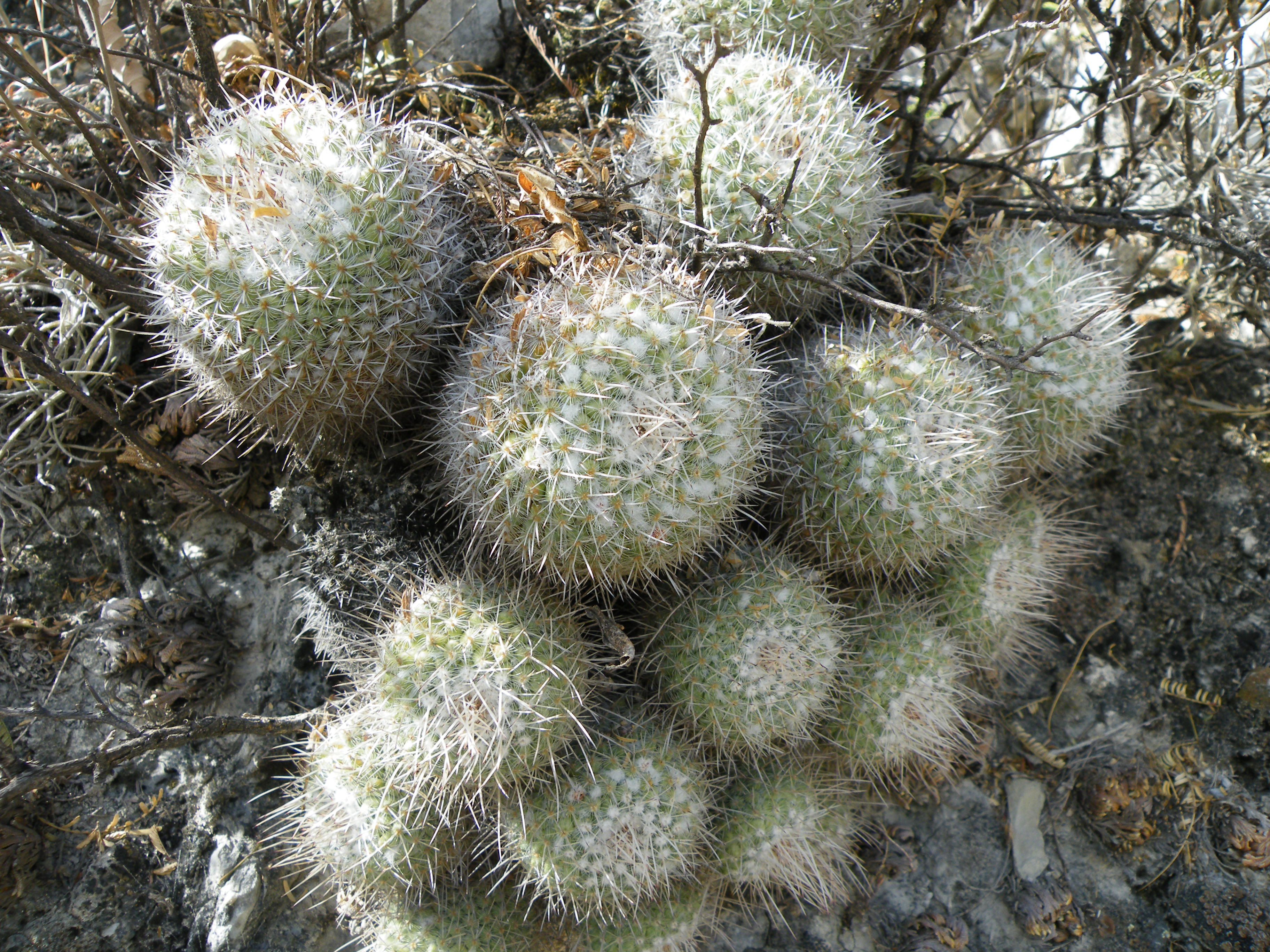 Near Rio Venados, Hidalgo